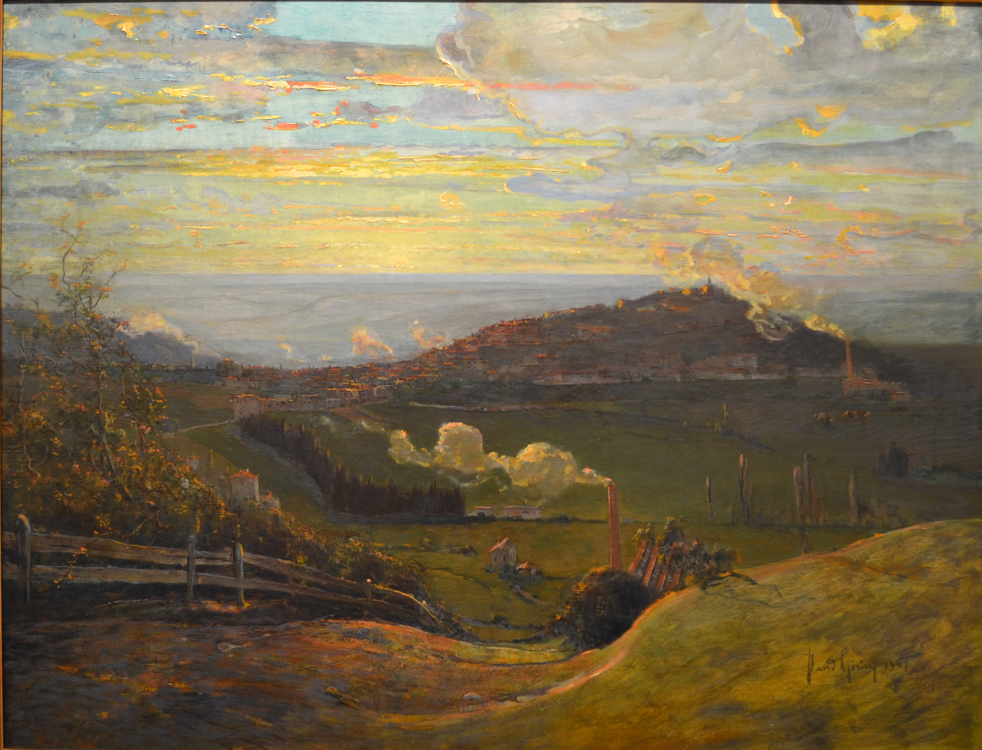 Tableau d'Eugène Girin représentant l'ancienne commune de Thizy (Rhône), devenue Thizy-les-bourg. Huile sur toile